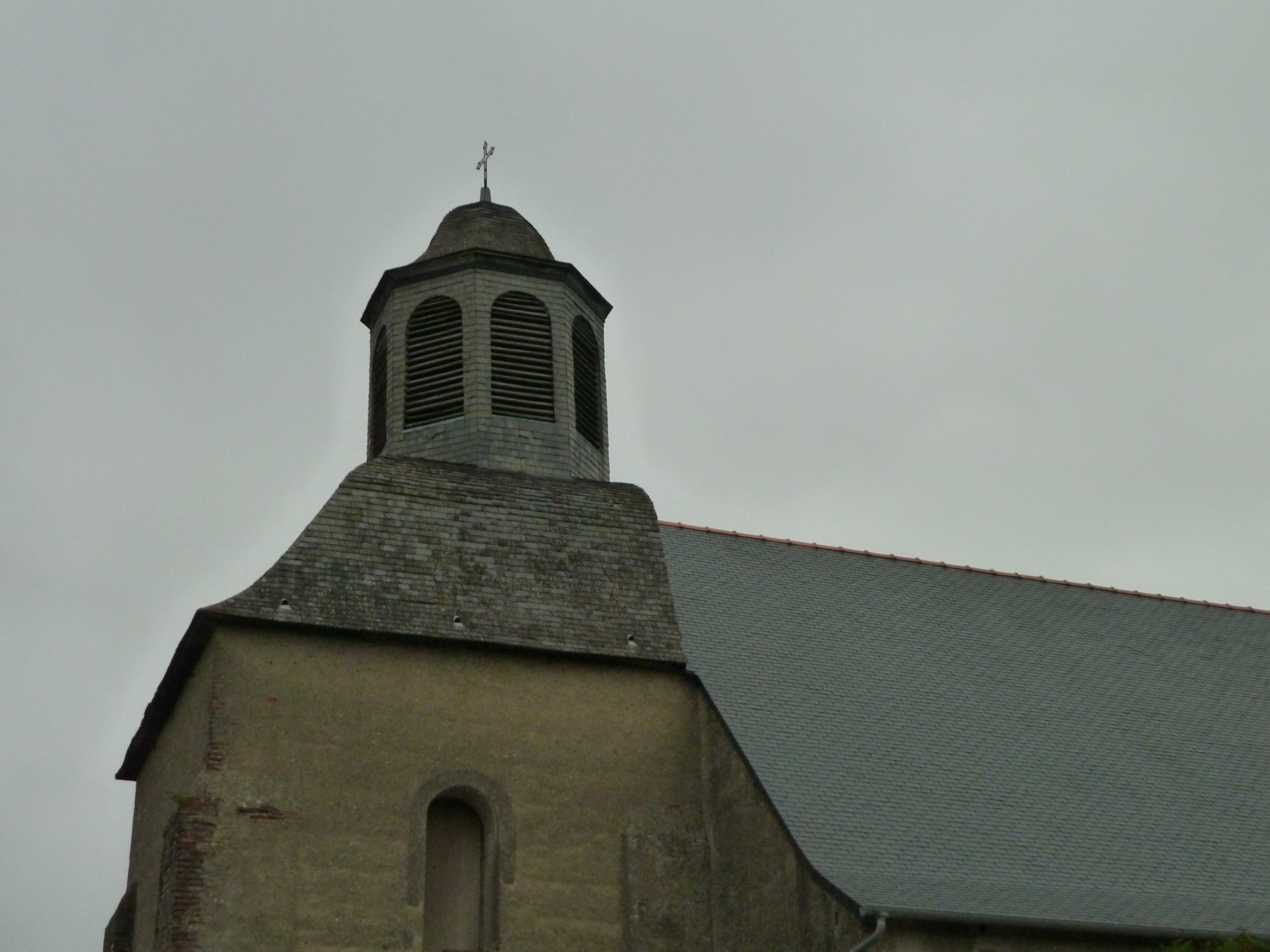 Clocher de l'église de Sarniguet